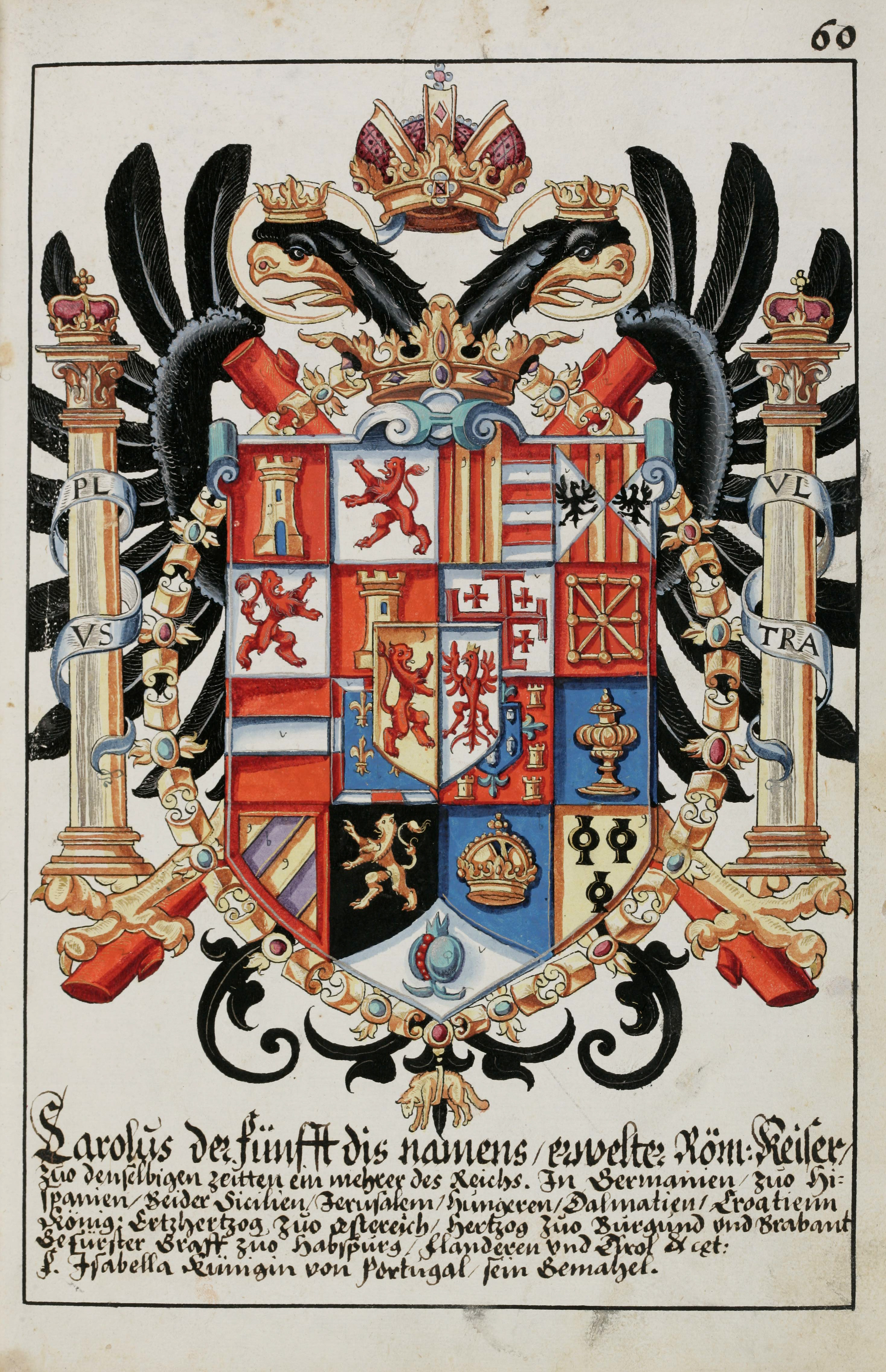 Wappenbuch des Hans Ulrich Fisch. Papier, 31.5 x 19.5 cm, Aarau 1627. Aarau, Staatsarchiv Aargau, V/4-1985/0001, fol. 60r